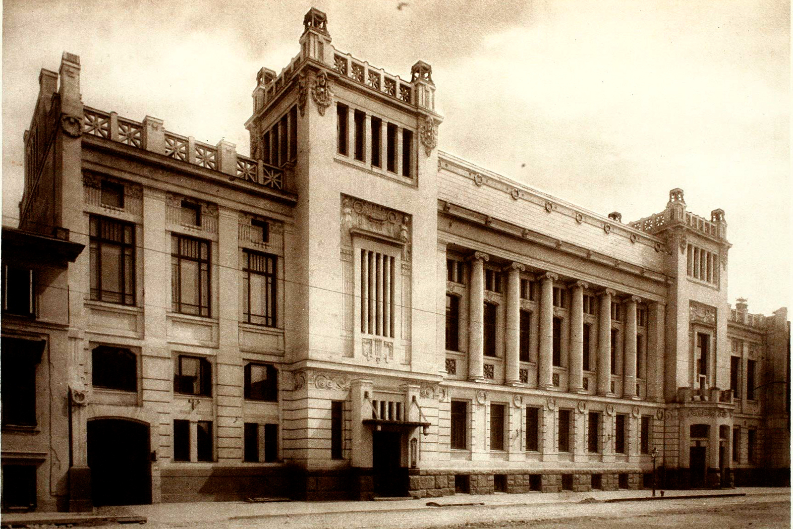 Купеческиий клуб на Малой Дмитровке